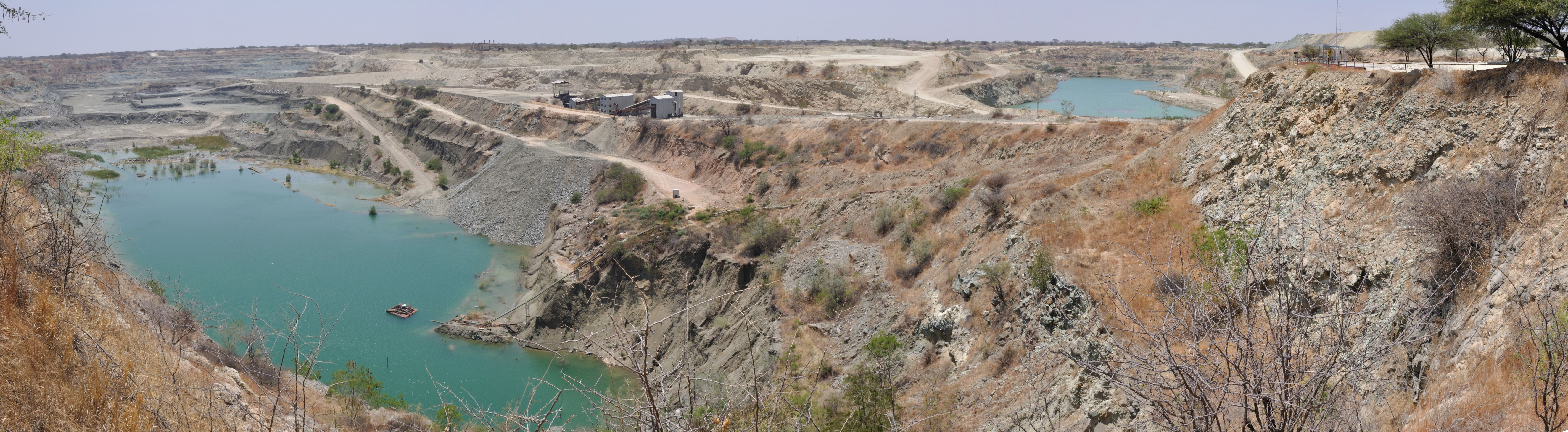 Tanzania, Williamson Diamond Mine in Mwadui